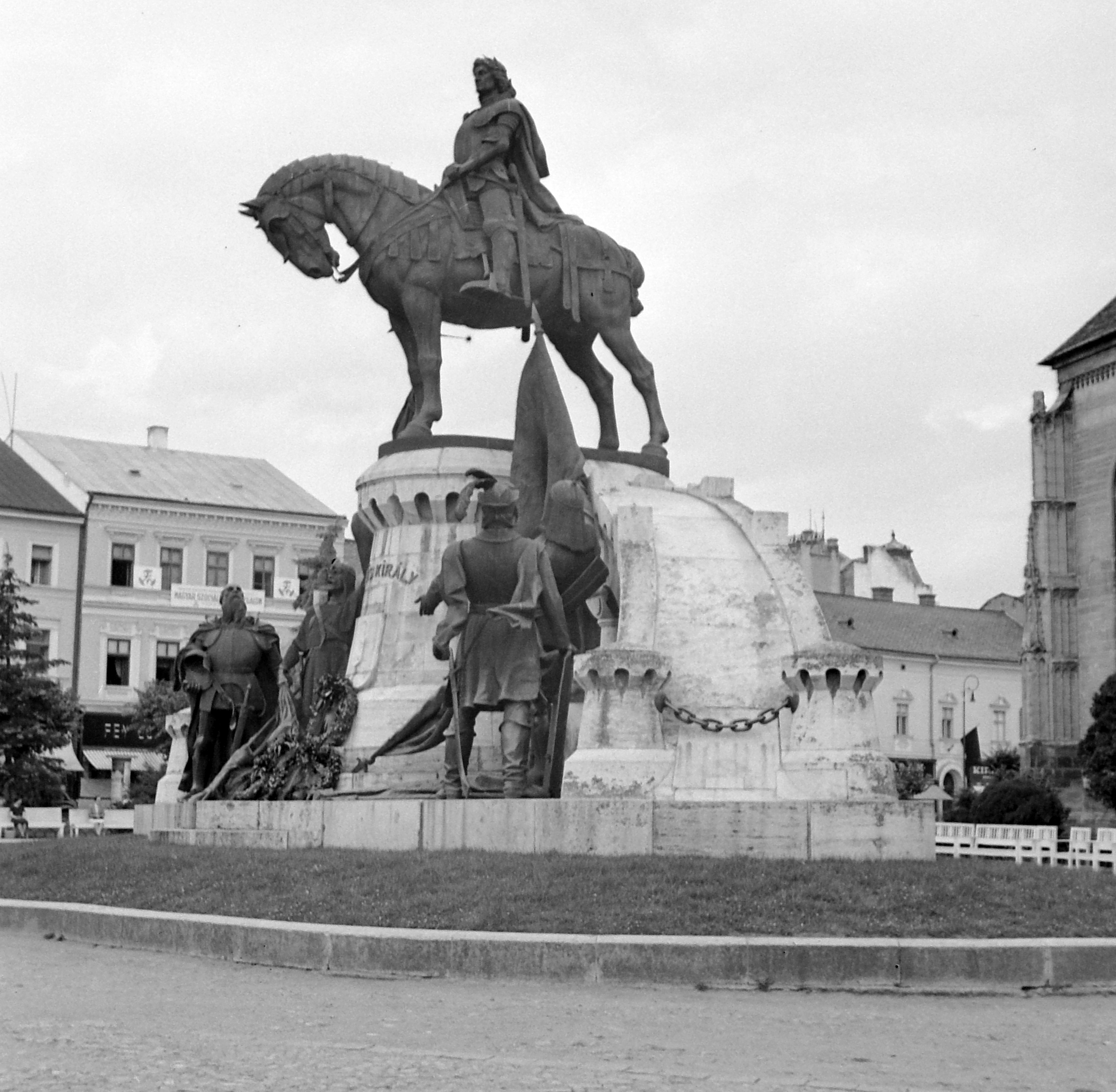 Fő tér, Hunyadi Mátyás szobra (Fadrusz János, 1902.). Location: Romania, Transylvania, Cluj-Napoca Tags: sculpture, horse sculpture Title: Fő tér, Hunyadi Mátyás szobra (Fadrusz János, 1902.).